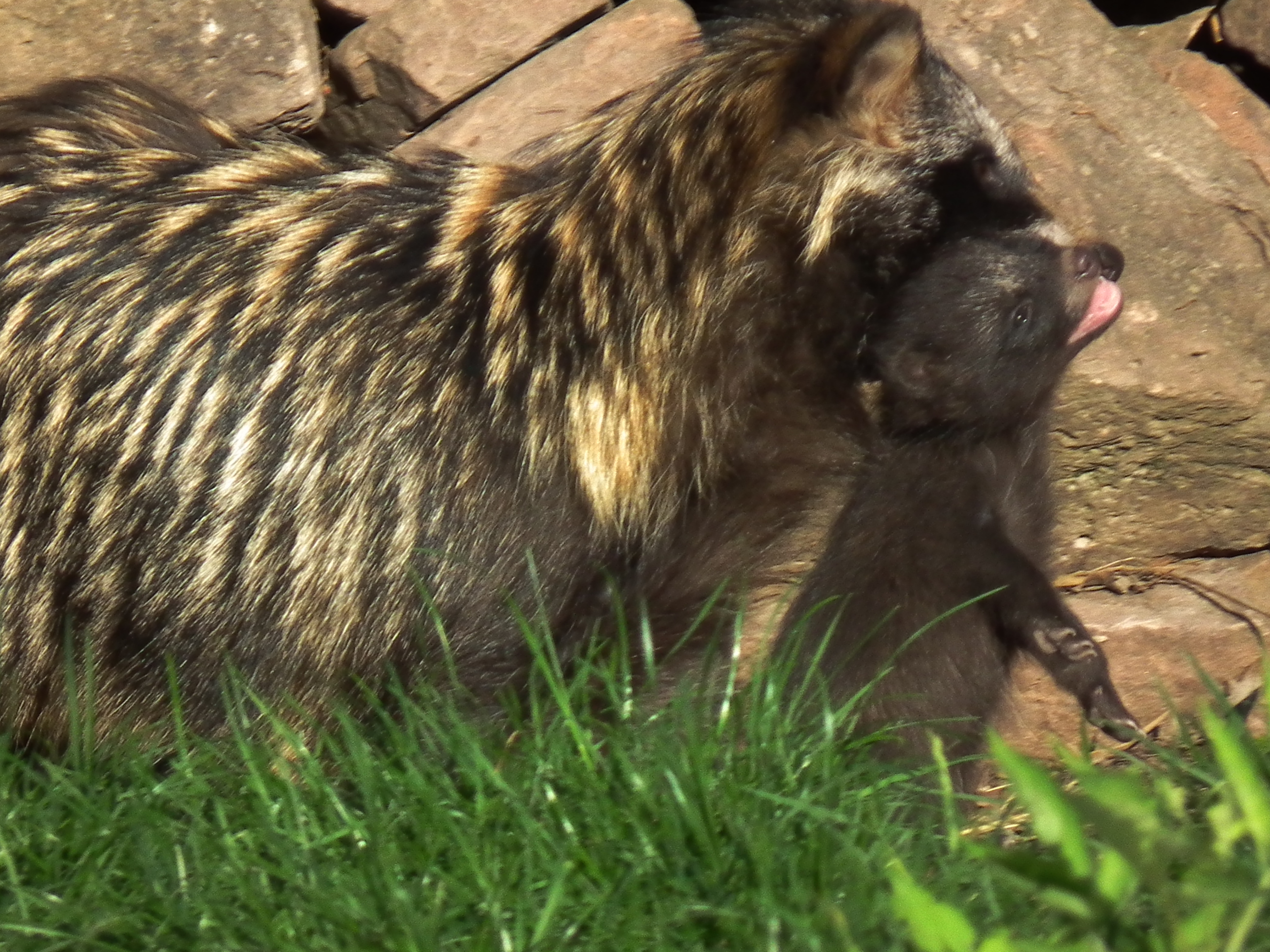 Marderhund (Nyctereutes procyonoides) im Wildpark Pforzheim (Baden-Württemberg, Deutschland)